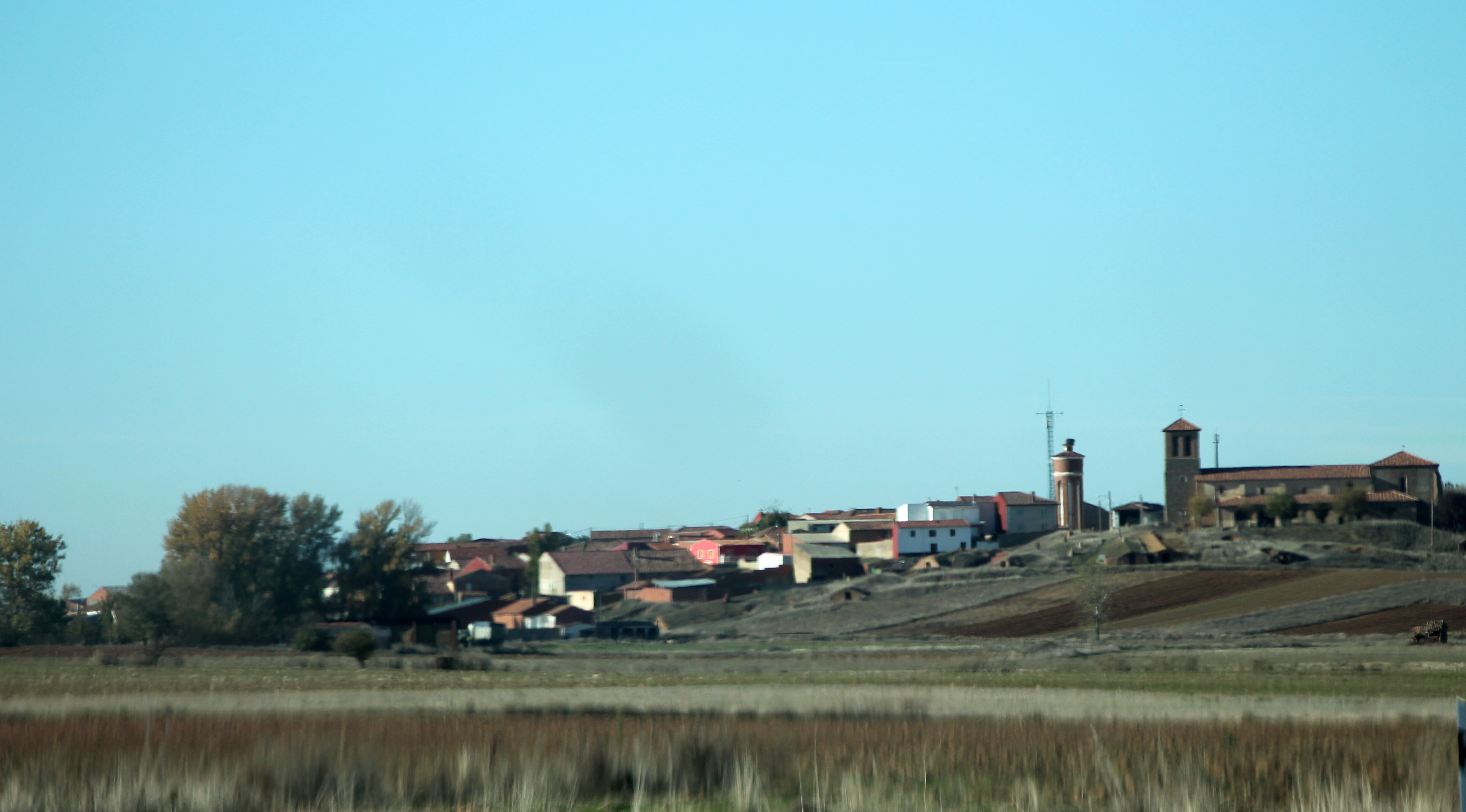 Valverde Enrique